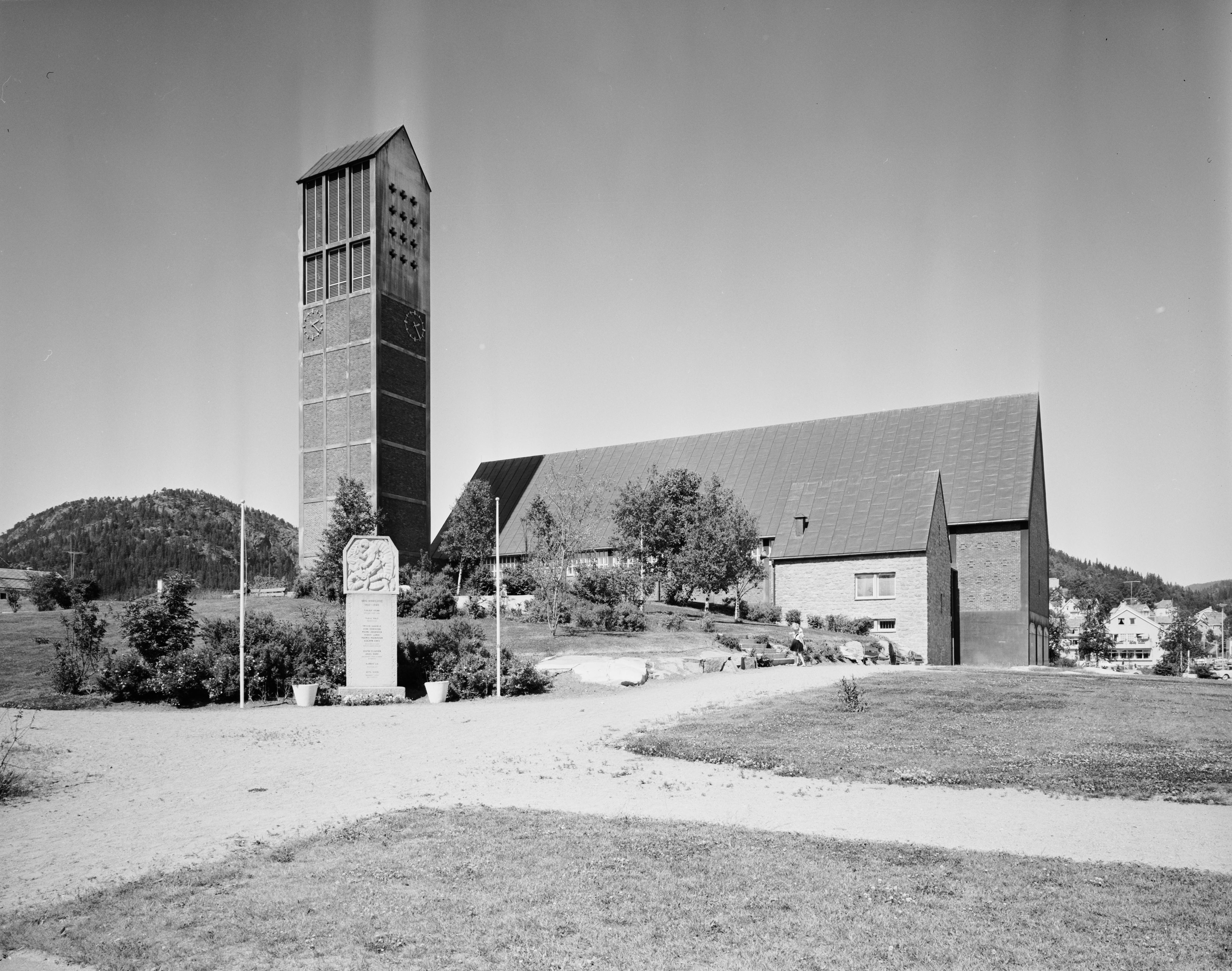 Bildet er hentet fra Nasjonalbibliotekets bildesamling. Anmerkninger til bildet var: fotograf: Å.L. Namsos, Namsos, Nord Trøndelag